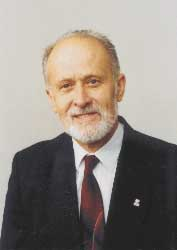 August Chelkowski - marszałek